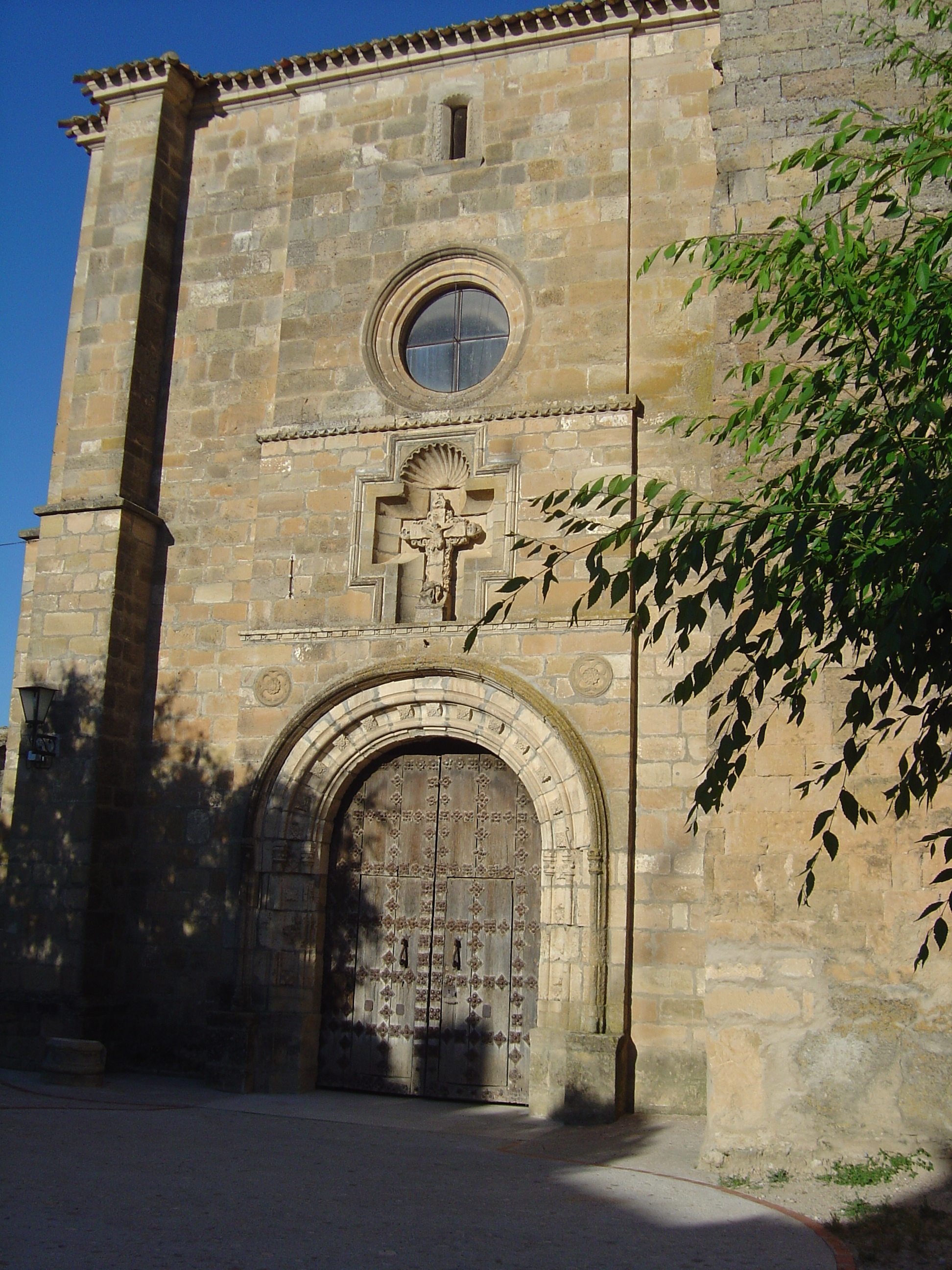 FACHADA DE LA IGLESIA de Valdeolivas